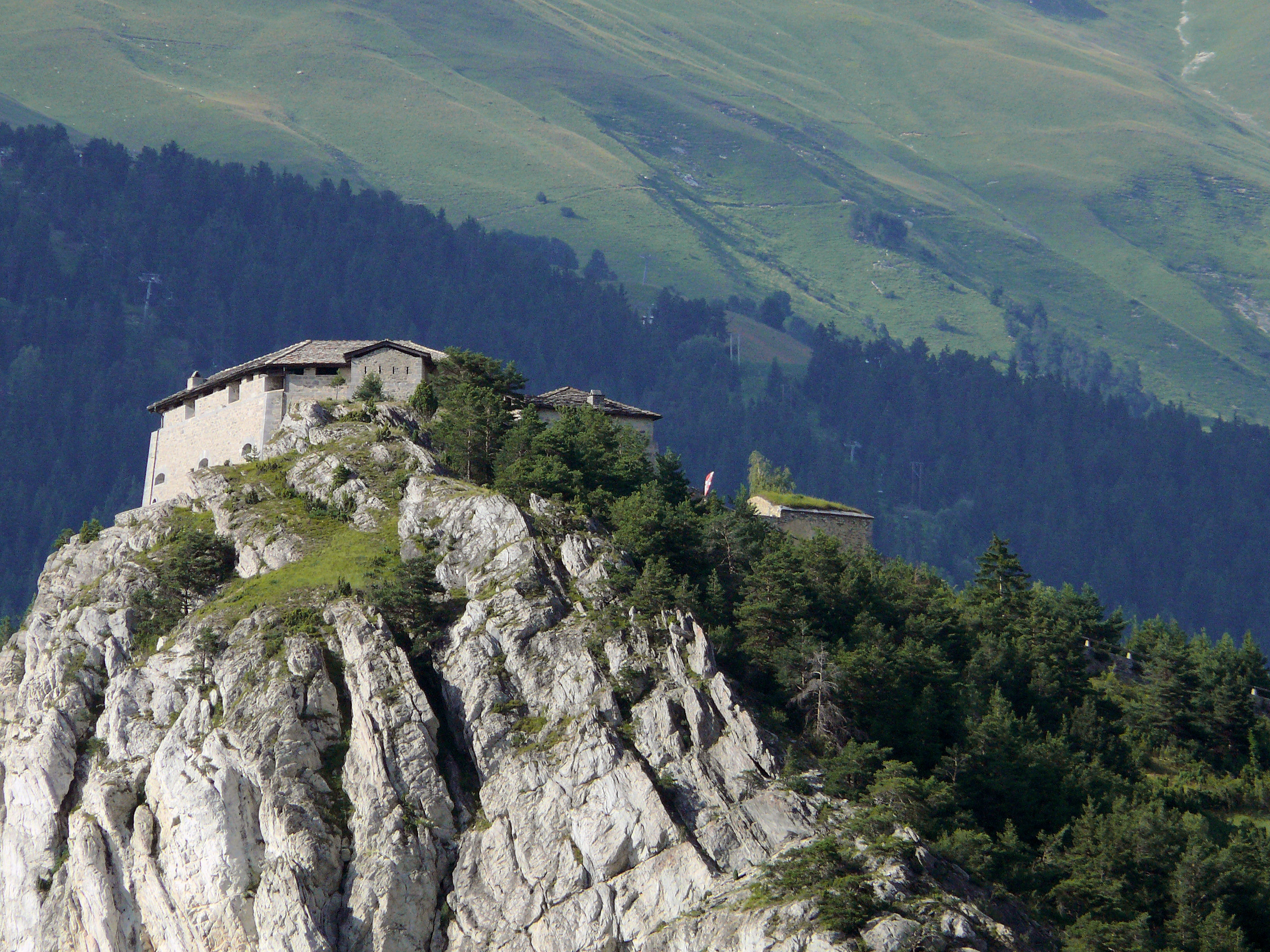 Aussois - Forts de l'Esseillon - Fort Marie-Christine